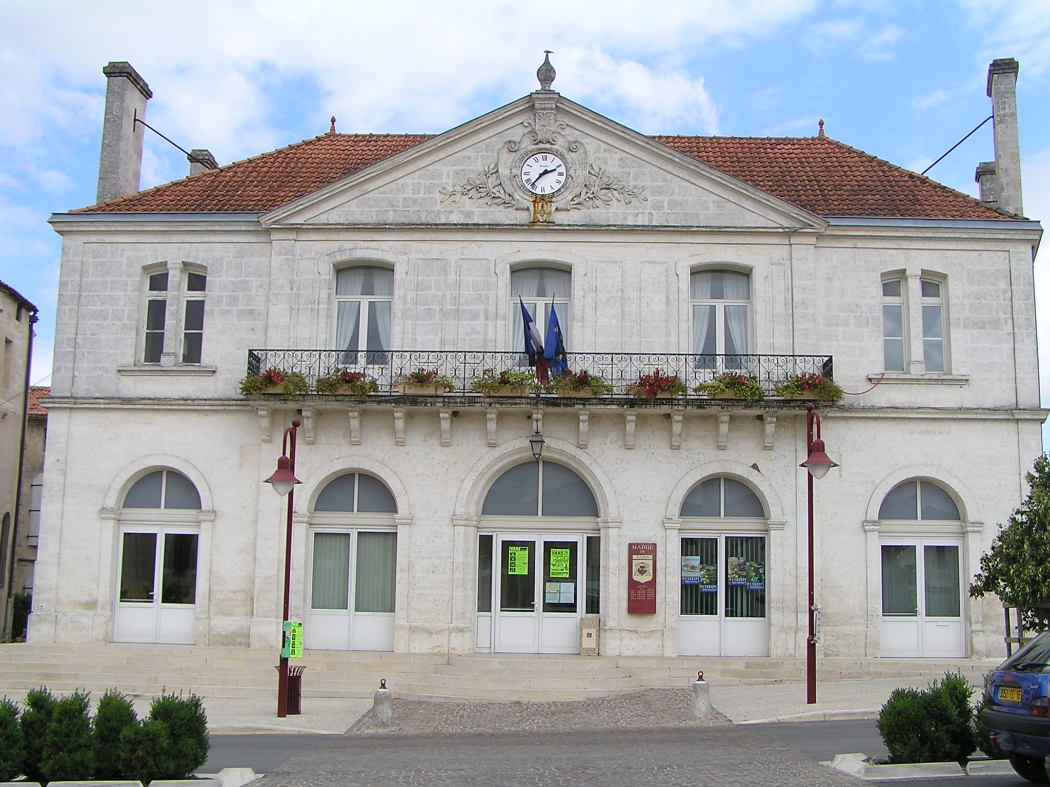 mairie de Vars